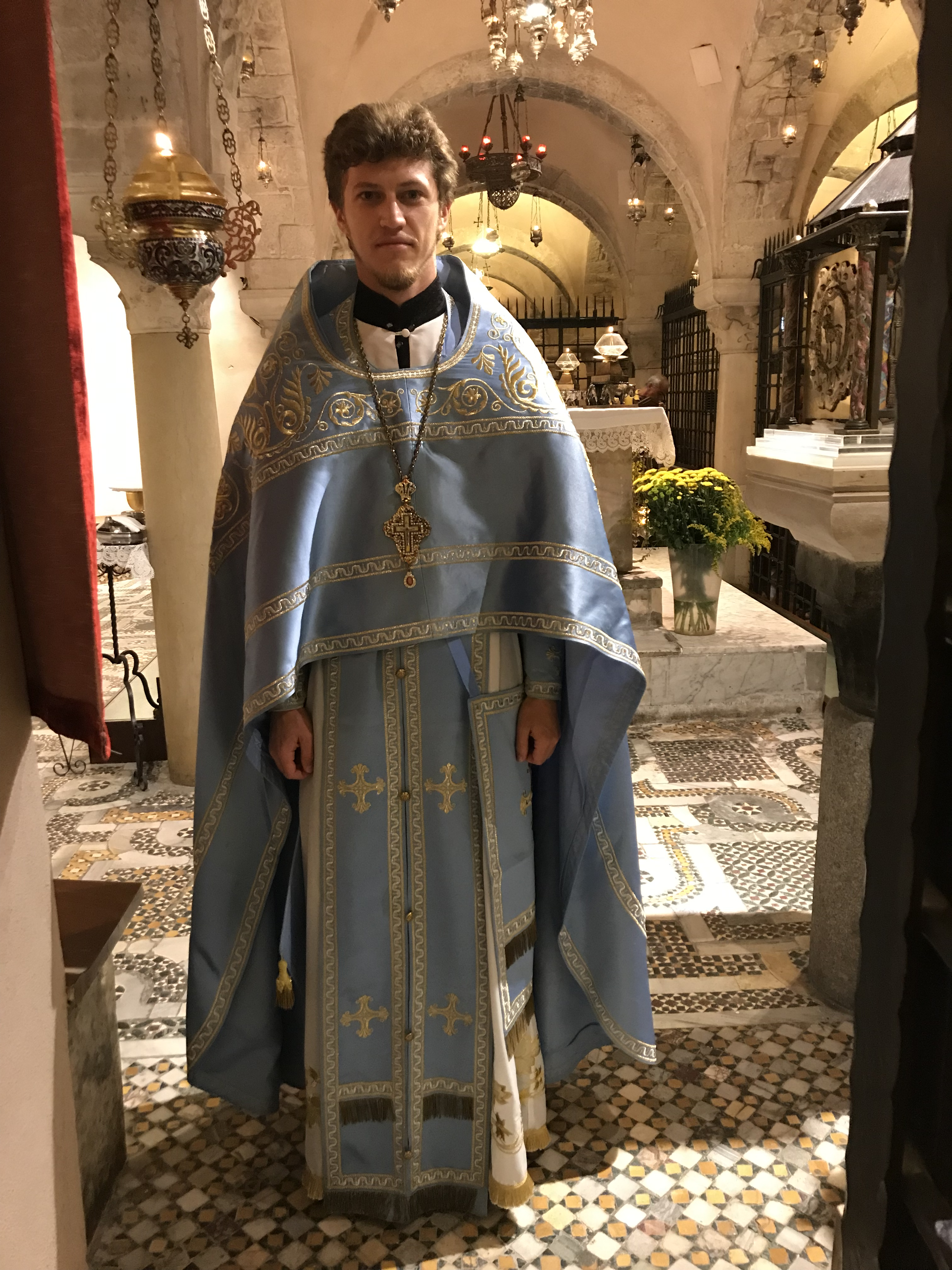 Протоієрей Володимир Міщук